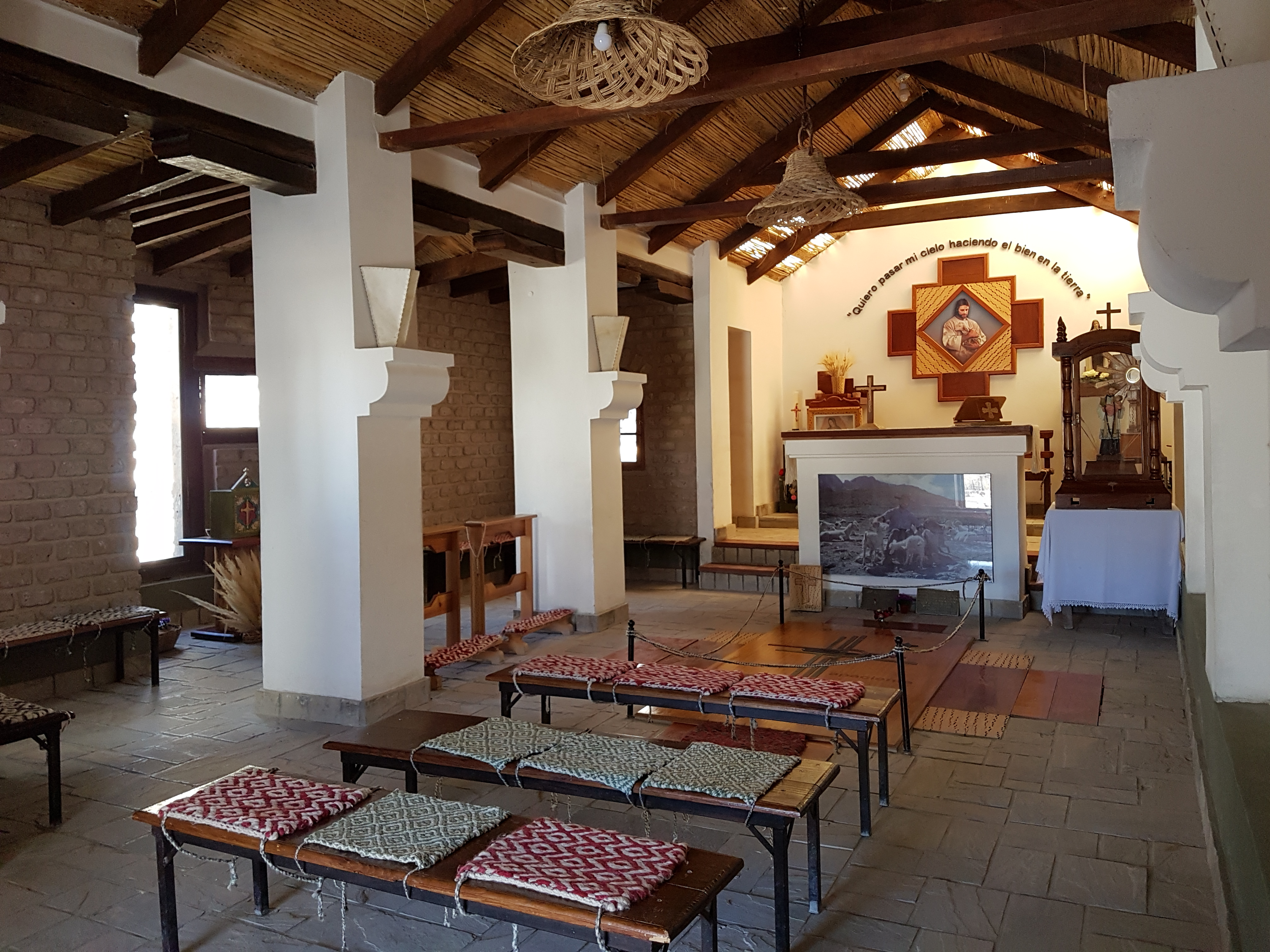 monumento cultural. lugares